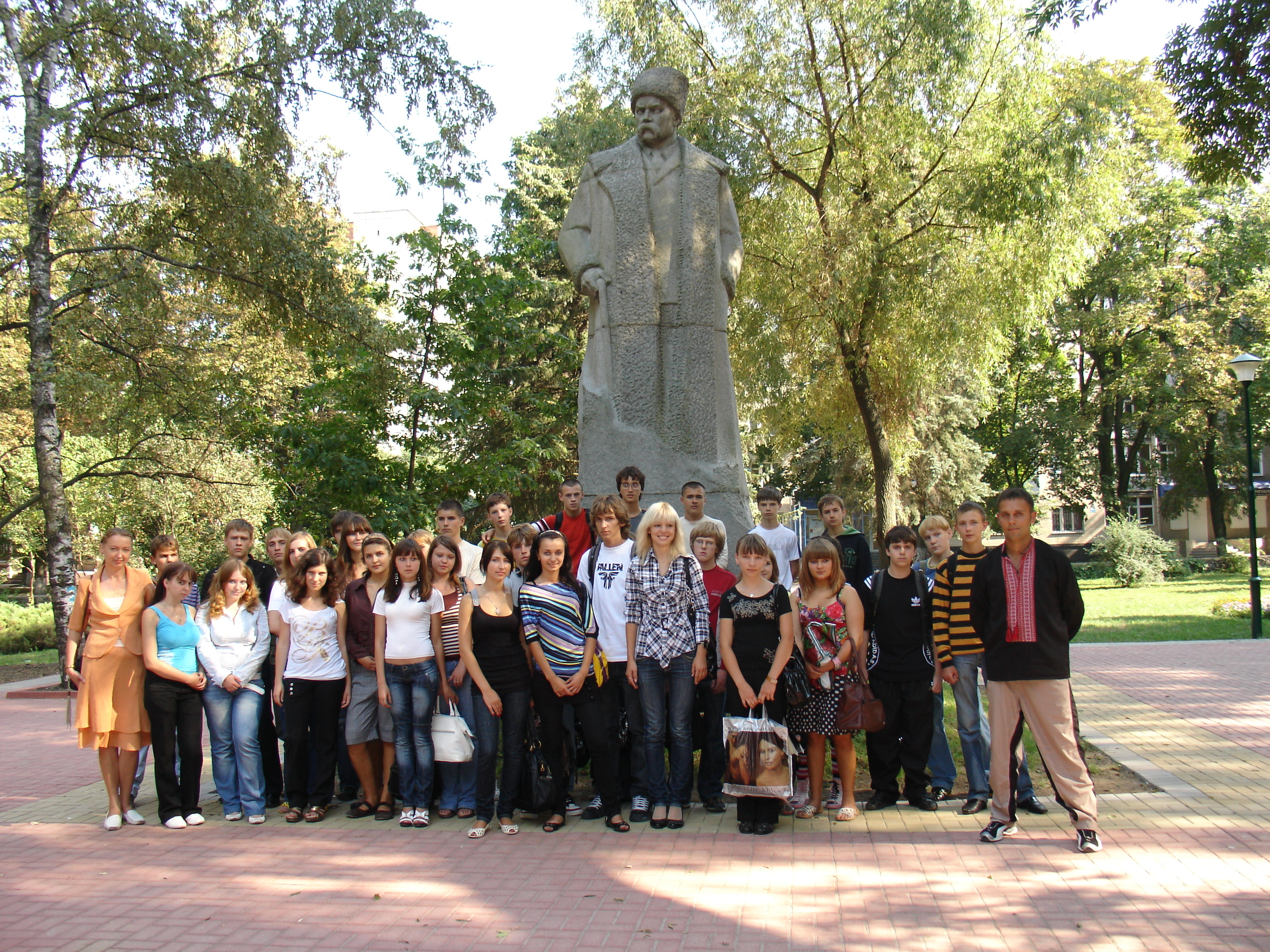 Тарасів дороговказ (2008) - Хмельницький